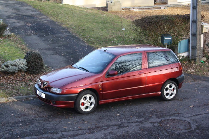 Alfa 145 série spéciale "Junior", elle se différencie par des bas de caisse siglés Junior, des jantes spécifiques ainsi que le chassis sport de la version Quadrifoglio Verde.